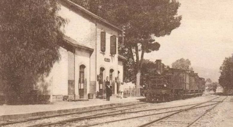 Gare de Béja — Tunisia.